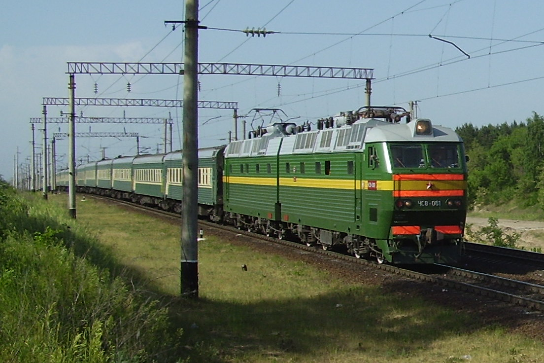 Электровоз ЧС8-061 с пассажирским поездом в районе ул.Остужева